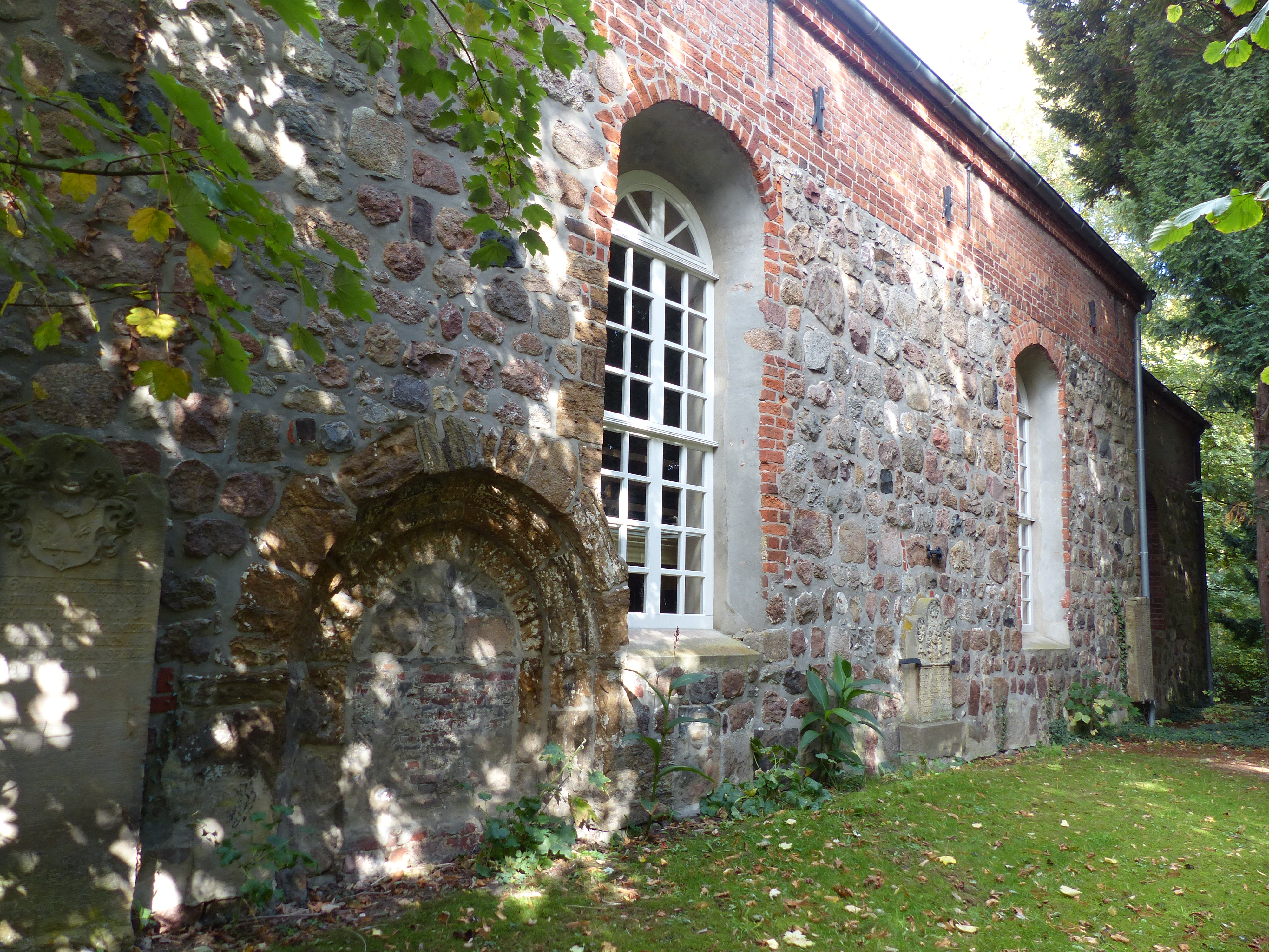 Südseite der Wulsdorfer Kirche in Bremerhaven von Westen